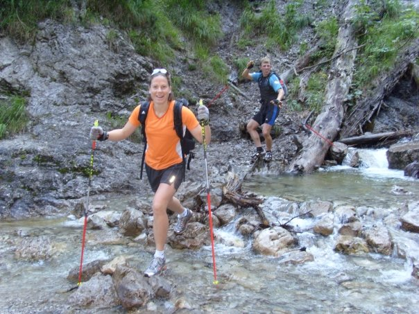 See Title